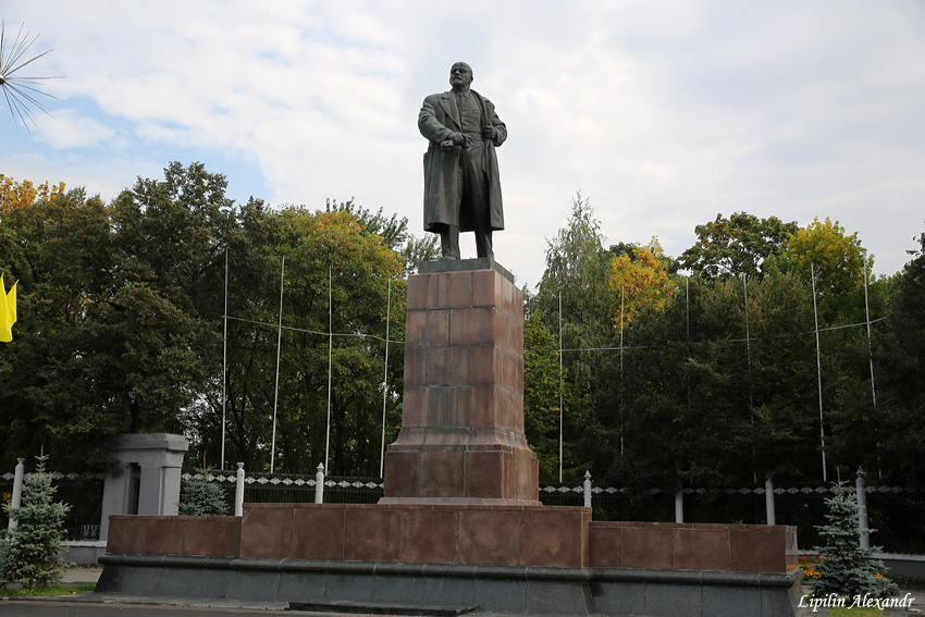 Гомель. Помнік Леніну